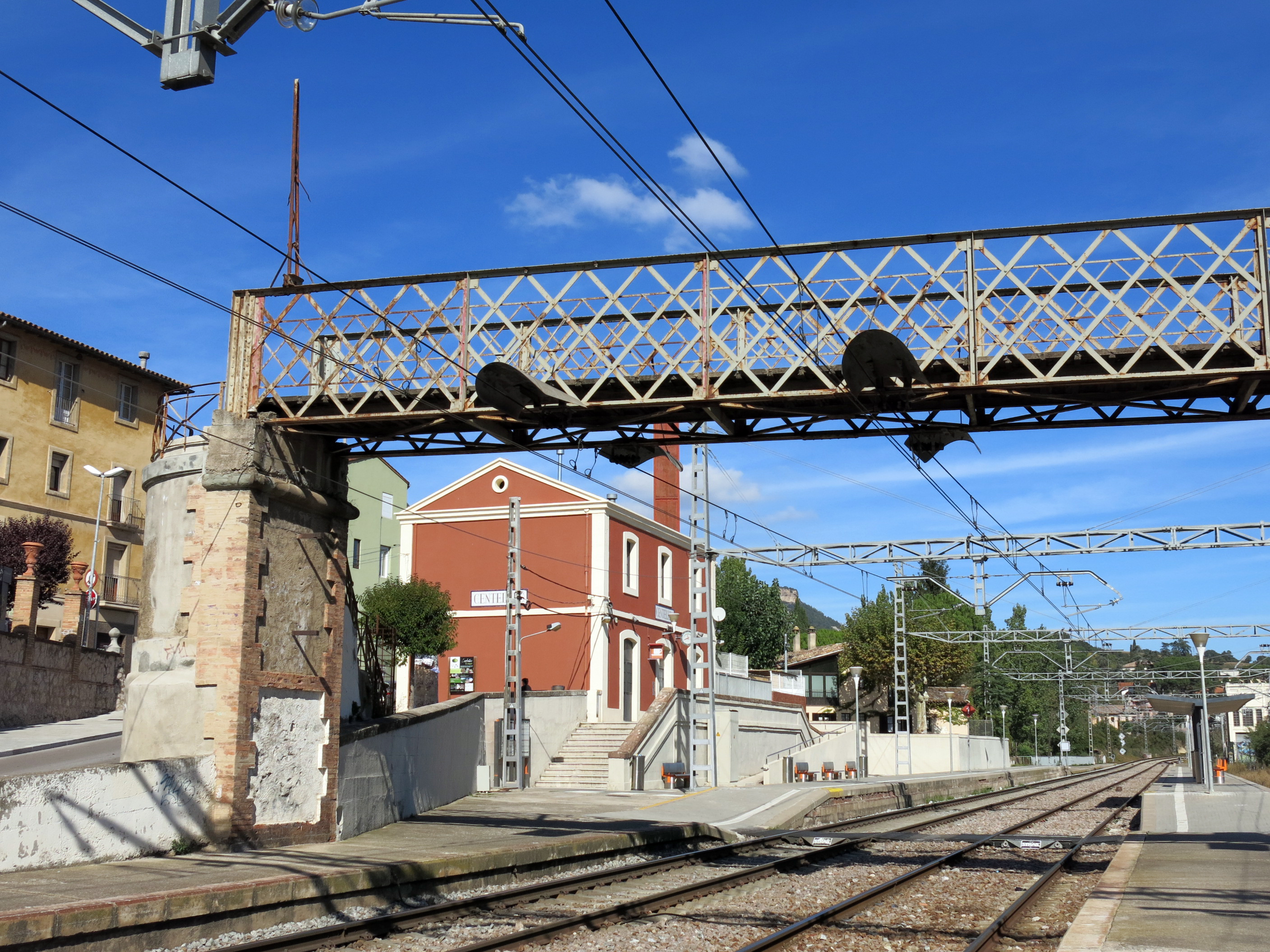 Pont de ferro (Centelles).